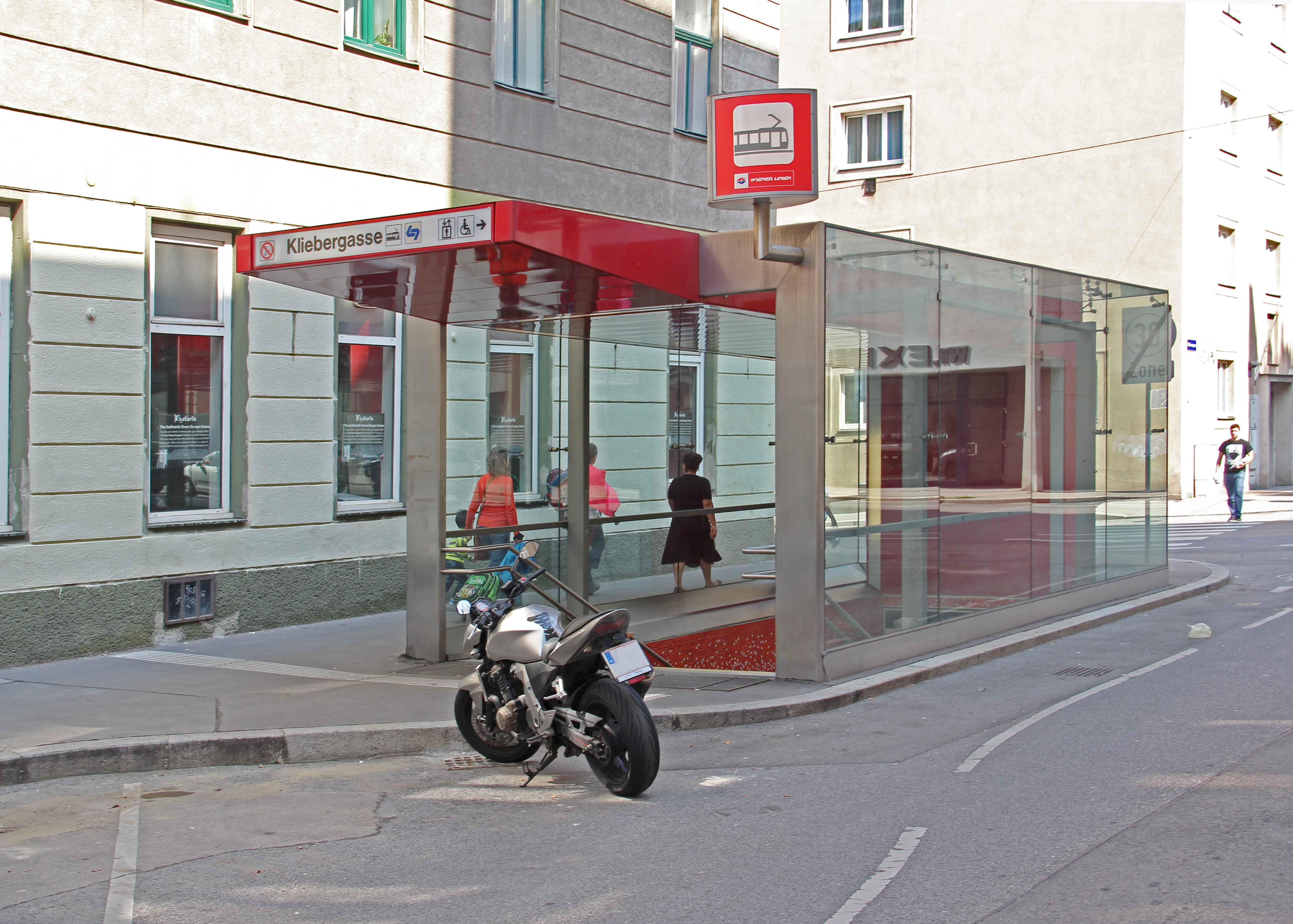 Der Ustrab-Abgang zur Haltestelle Kliebergasse in der Gassergasse